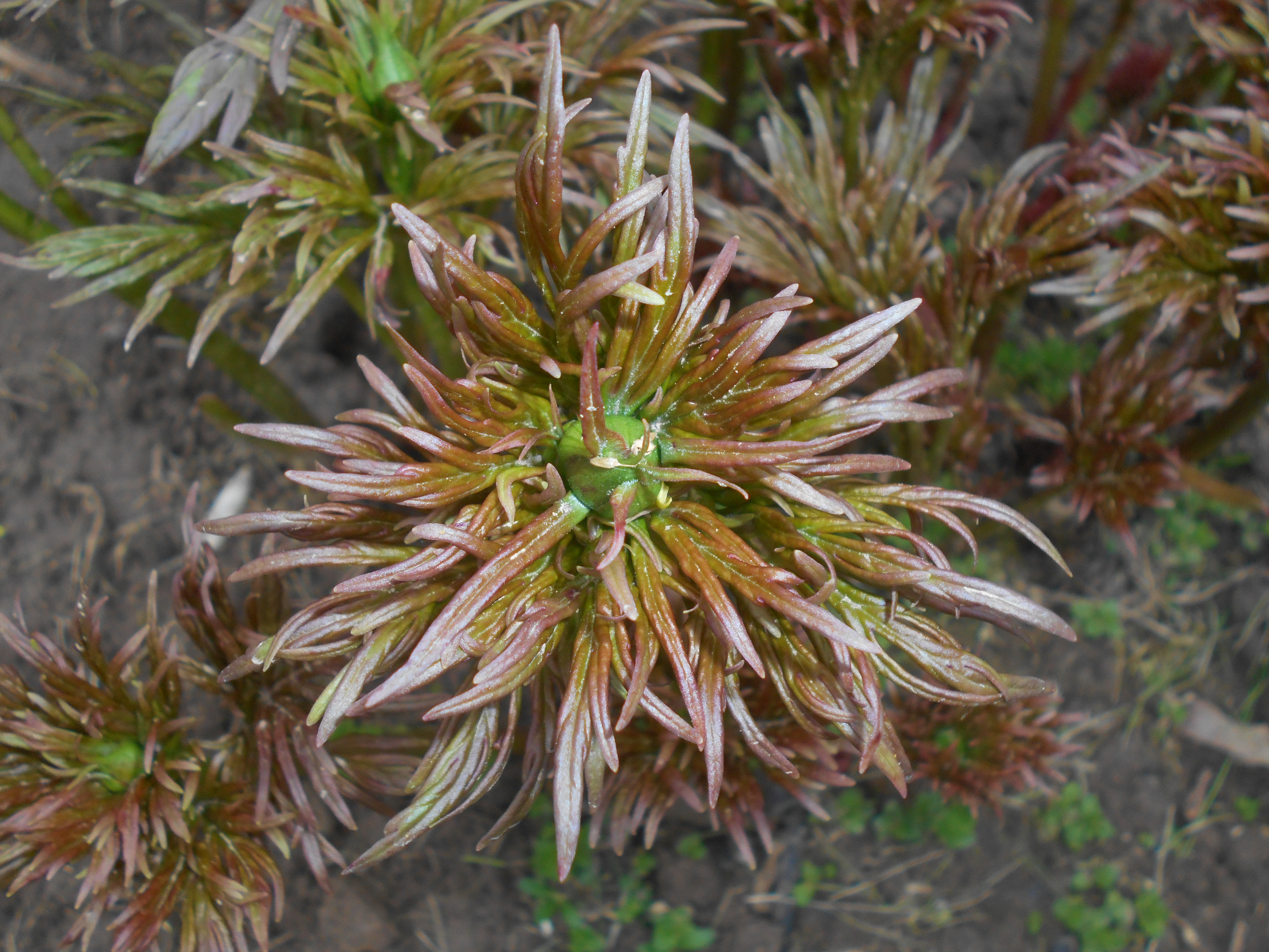 Piwonia odmienna (Paeonia anomala), Ogród Botaniczny UMCS w Lublinie